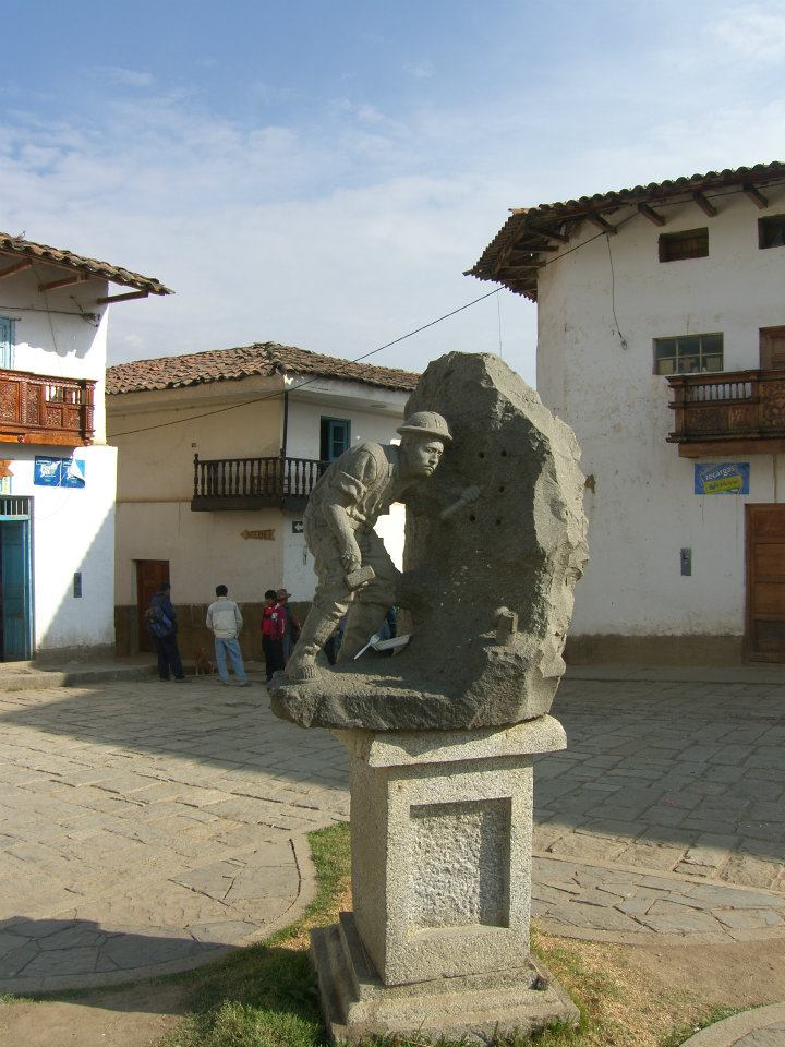 Estatua en la esquina del barrio de Alameda en honor a los mineros de la Provincia de Asunción.